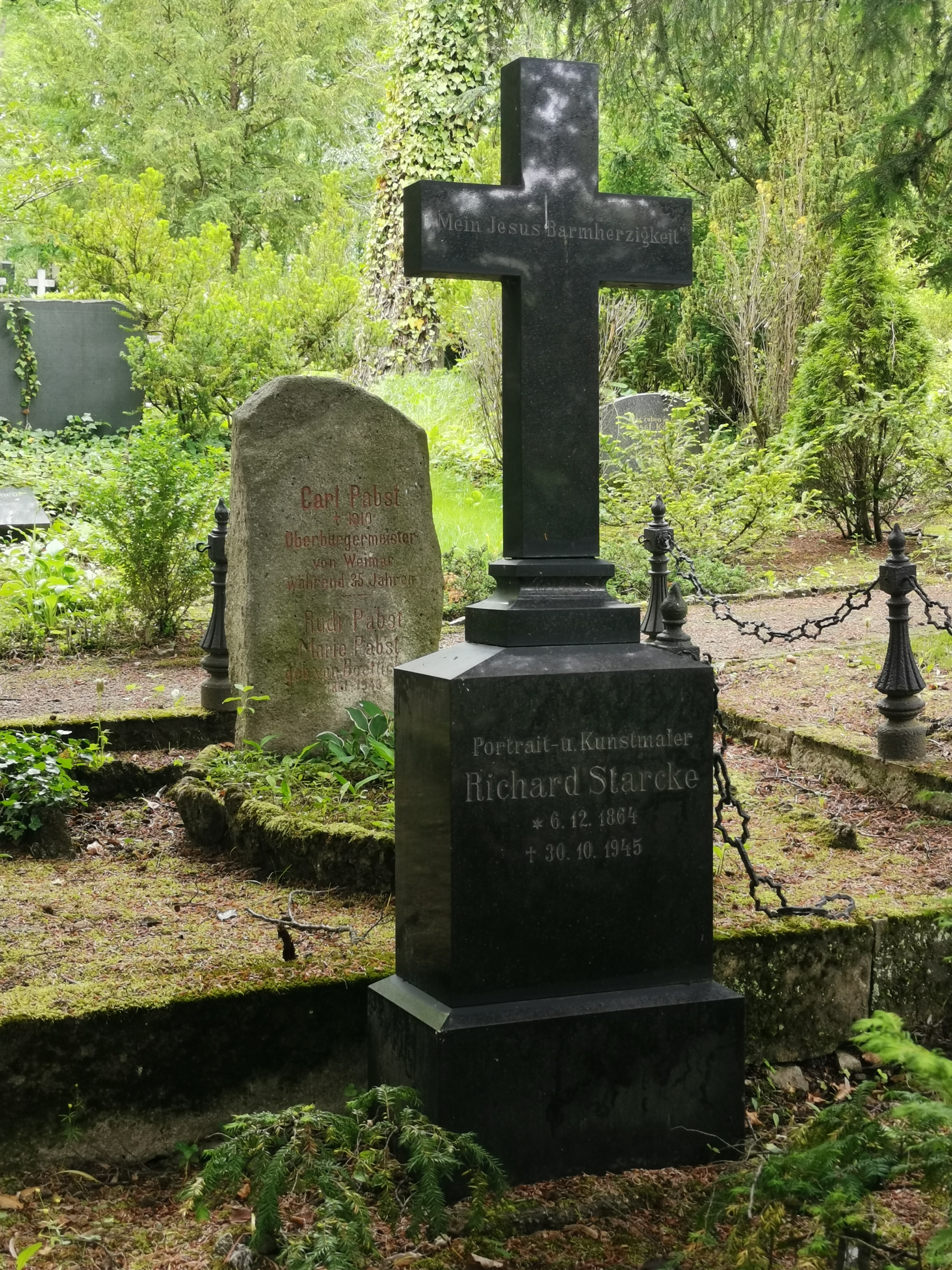 Grab von Richard Starcke; Historischer Friedhof Weimar